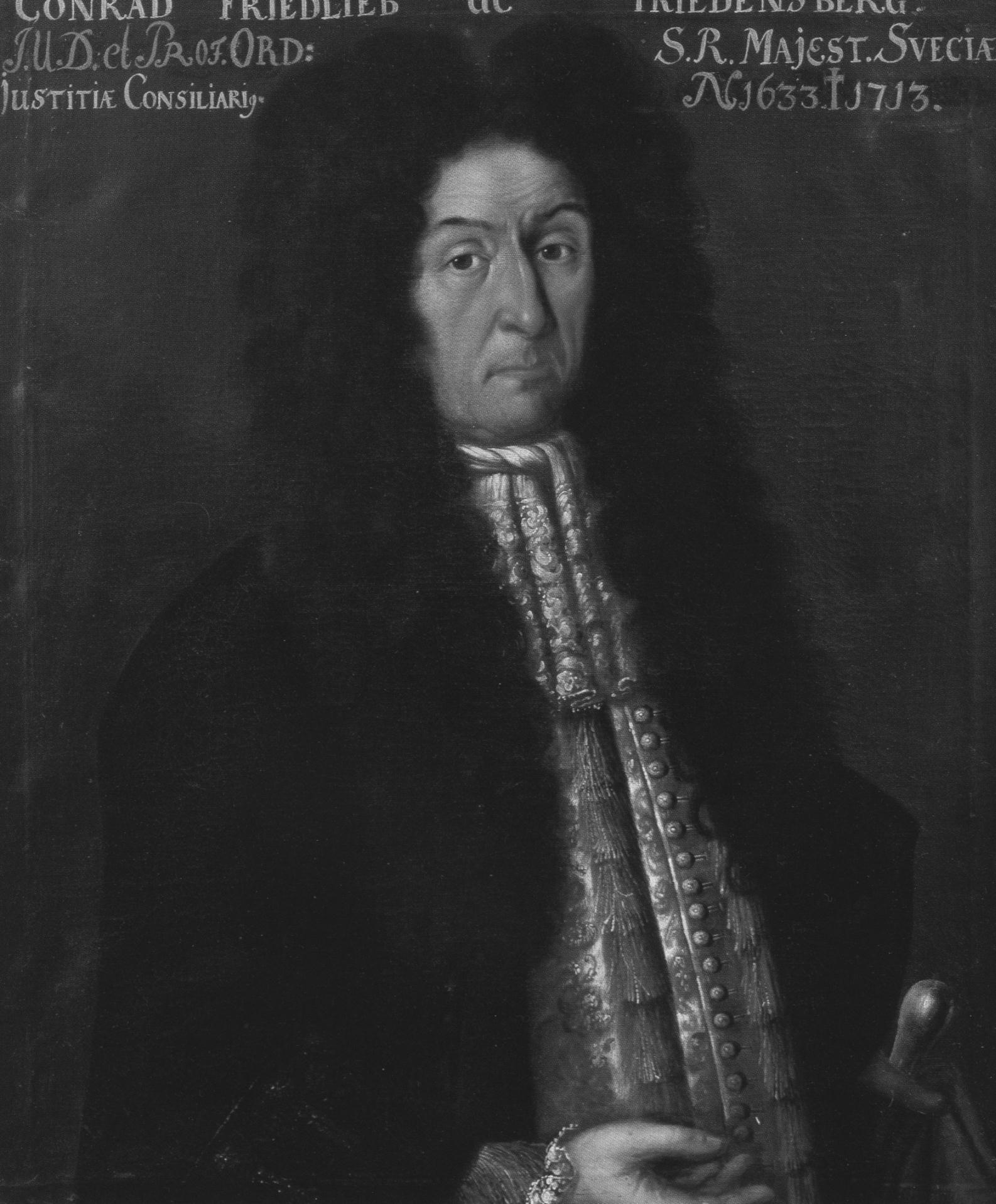 Conrad Friedlieb von Friedensberg (1633–1713)